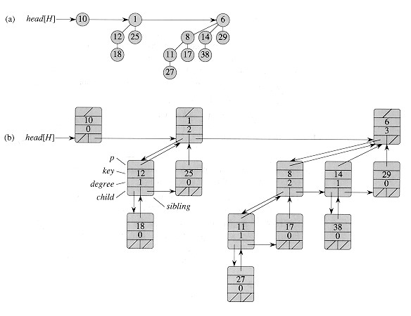 조선말: 과제를 위한 일시적인 이미지 사용